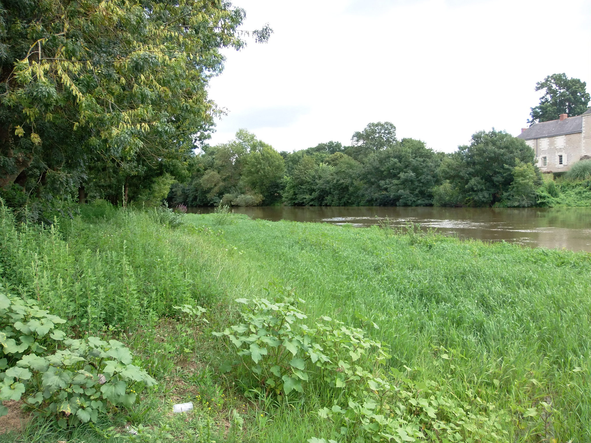 Le Louet, bras de la Loire, à Rochefort-sur-Loire (Maine-et-Loire, France).